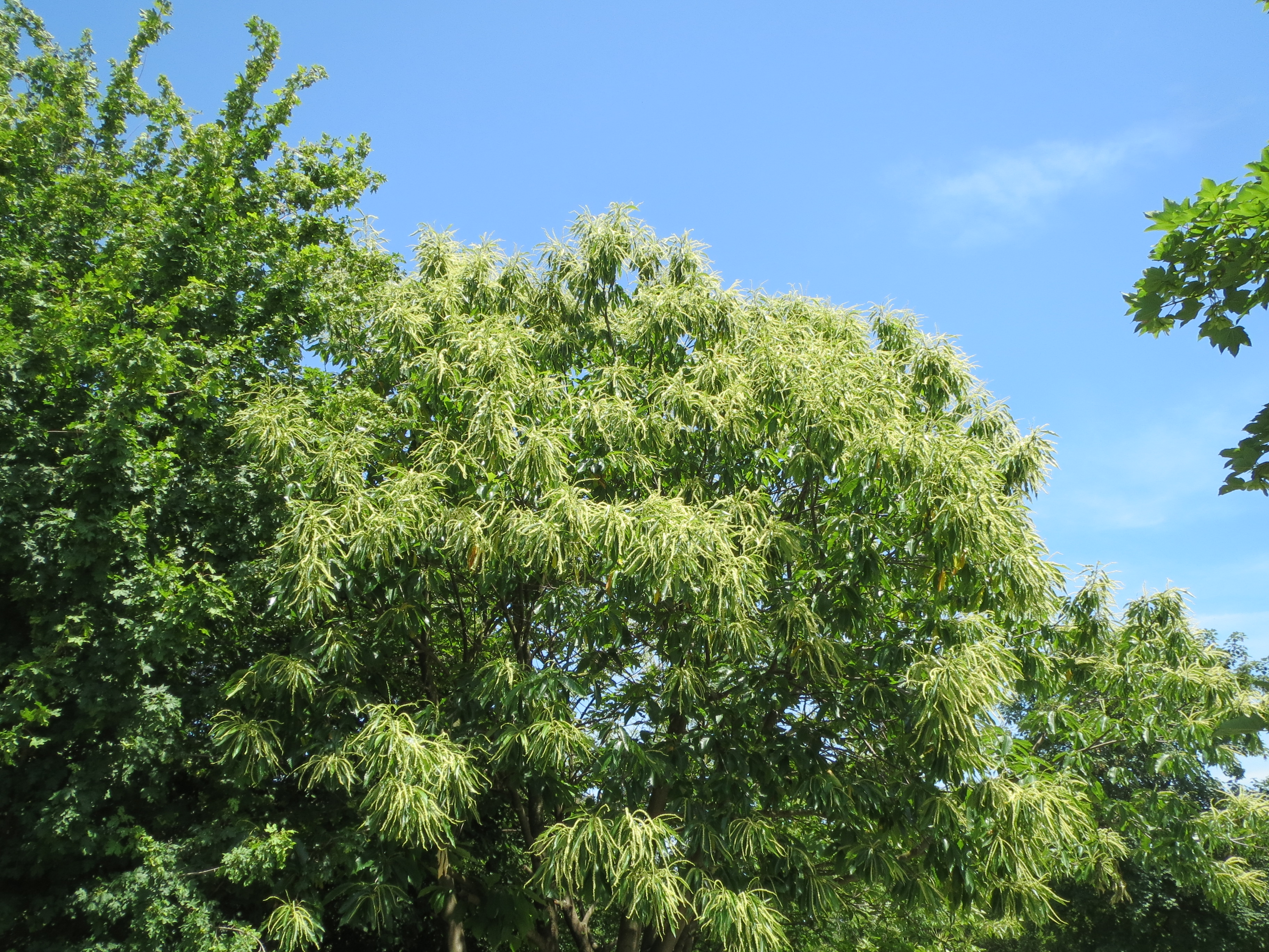 Edelkastanie (Castanea sativa) im Gartenschaupark Hockenheim